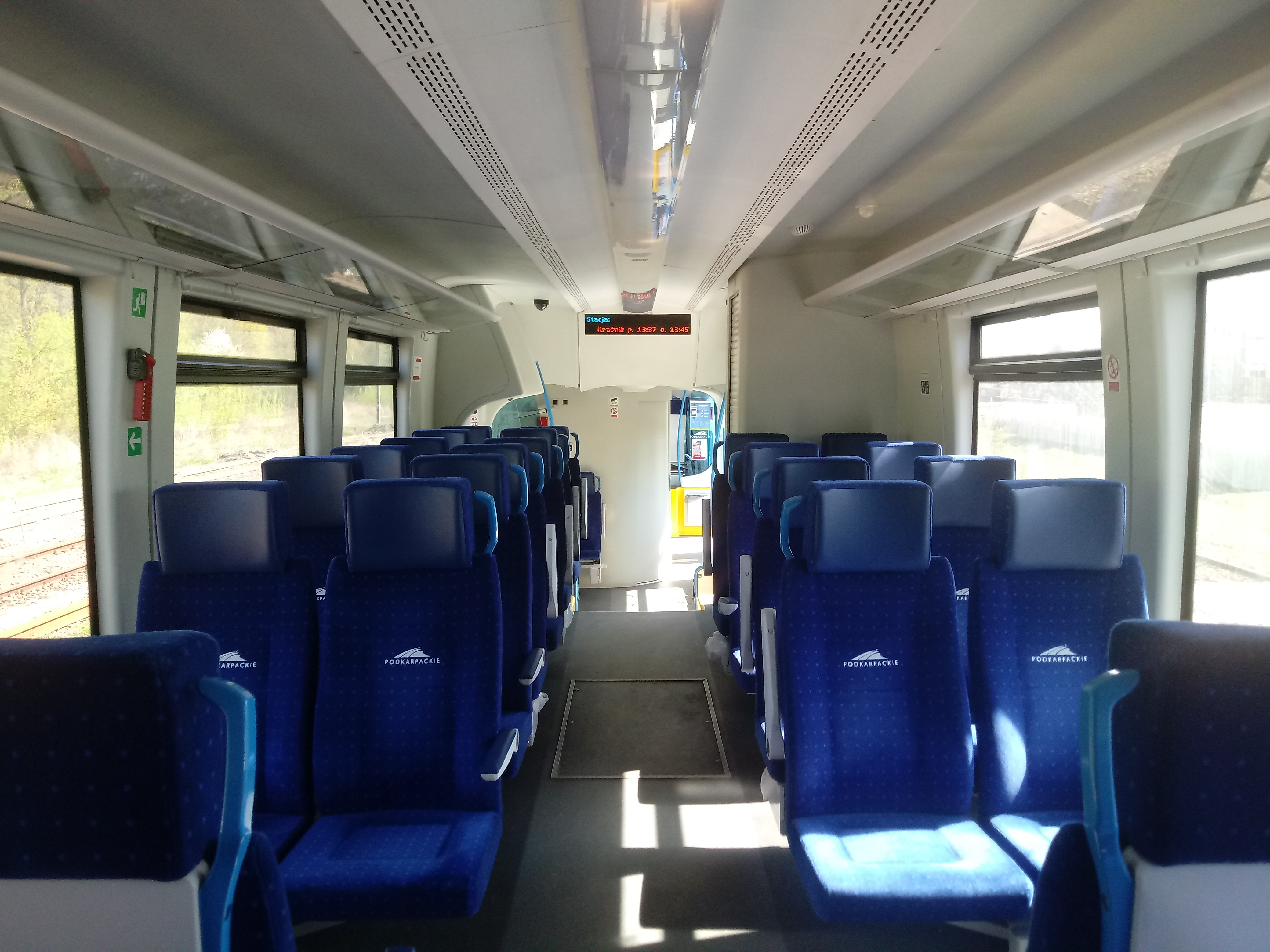 Wnętrze autobusu szynowego SA135-023